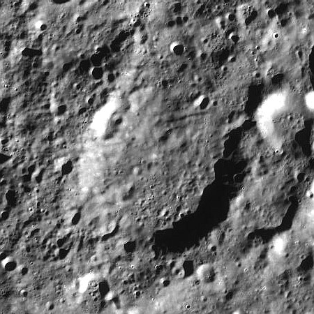 月球勘测轨道飞行器拍摄的石申坑照片